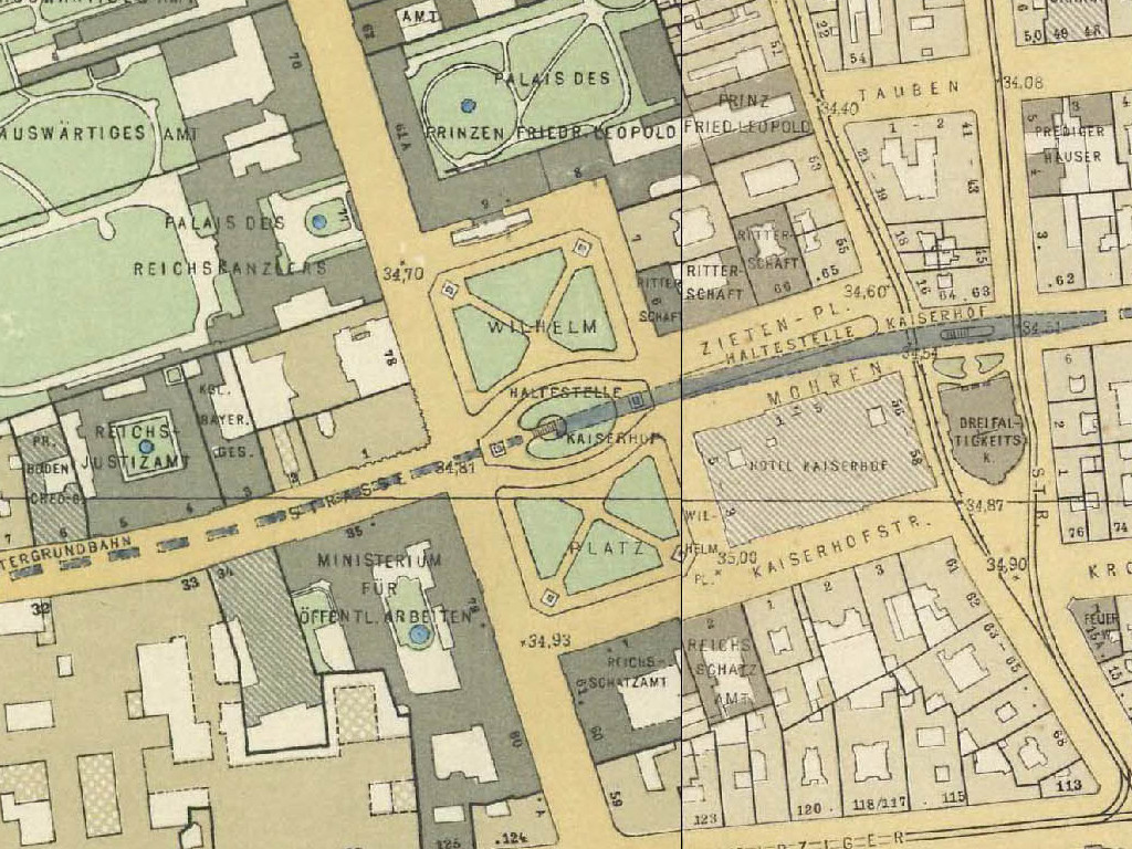 Straubeplan Wilhelmplatz